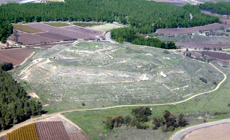 תל לכיש - צילום אוויר לכיוון צפון מערב רישיון נוצר על ידי משתמש:אסף.צ